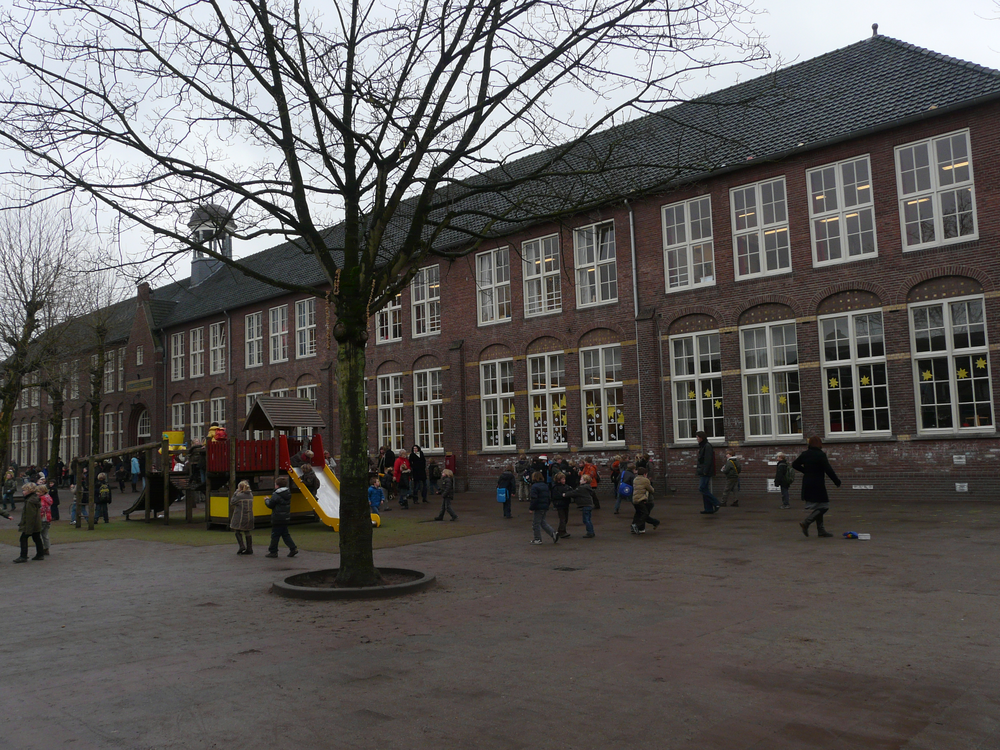 Voormalige Sint Laurentiusschool in de Dillenburgstraat in het Ginneken in het zuiden van Breda